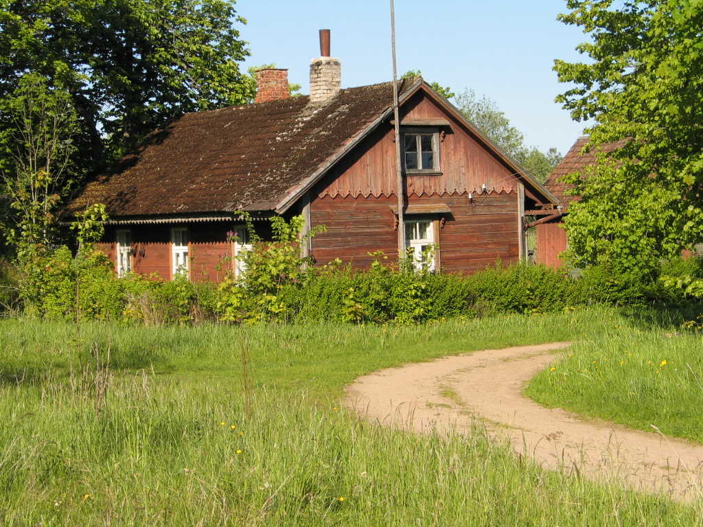 Halliste raudteejaama elamu